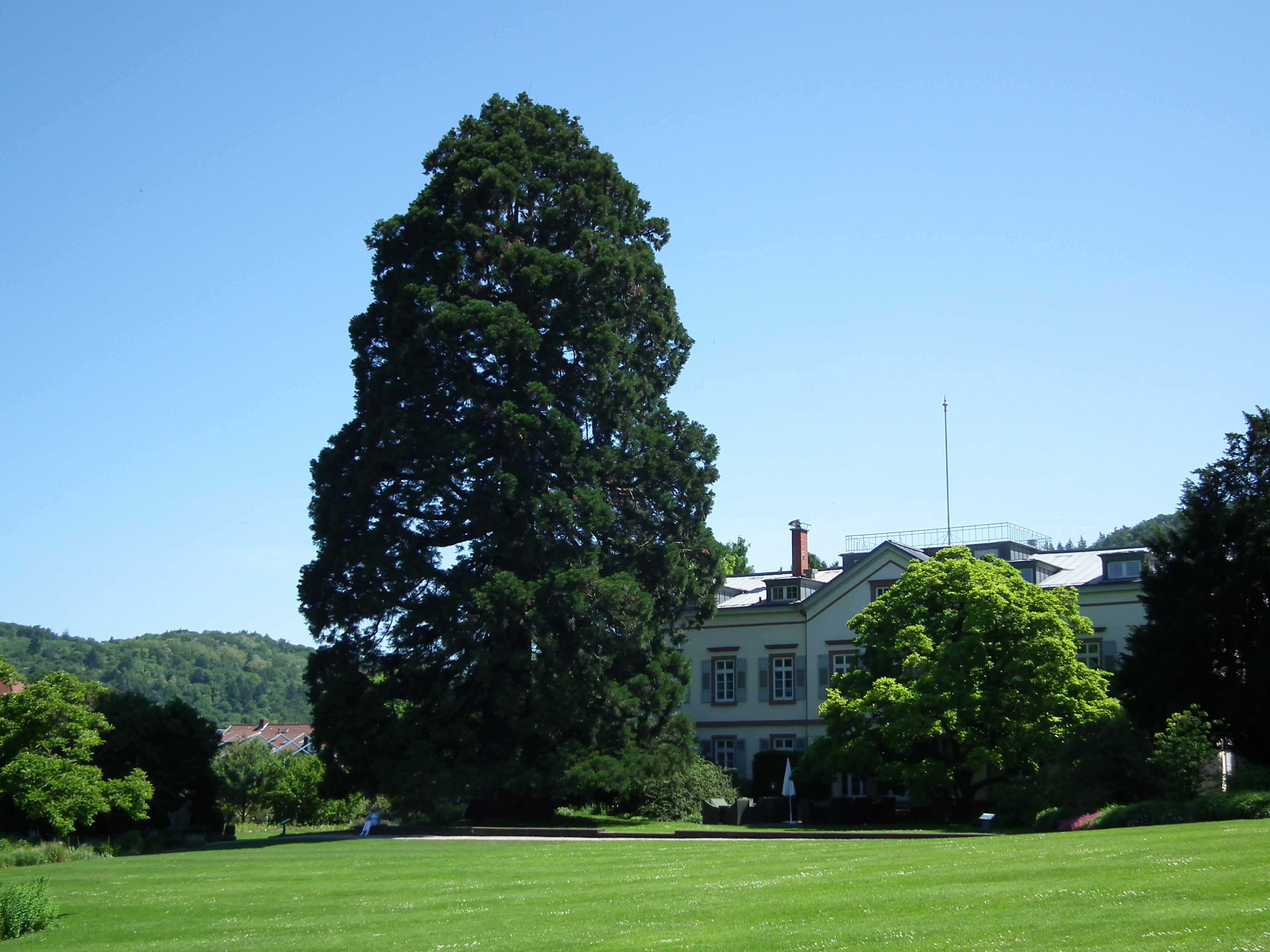 Mammutbaum (Sequoiadendron giganteum) im Schau- und Sichtungsgarten Hermannshof in Weinheim (Baden-Württemberg, Deutschland), Pflanzjahr 1888, Höhe lt. Schild ohne Jahresangabe 30 Meter, Stammumfang in 1 Meter Höhe ca. 8 Meter)